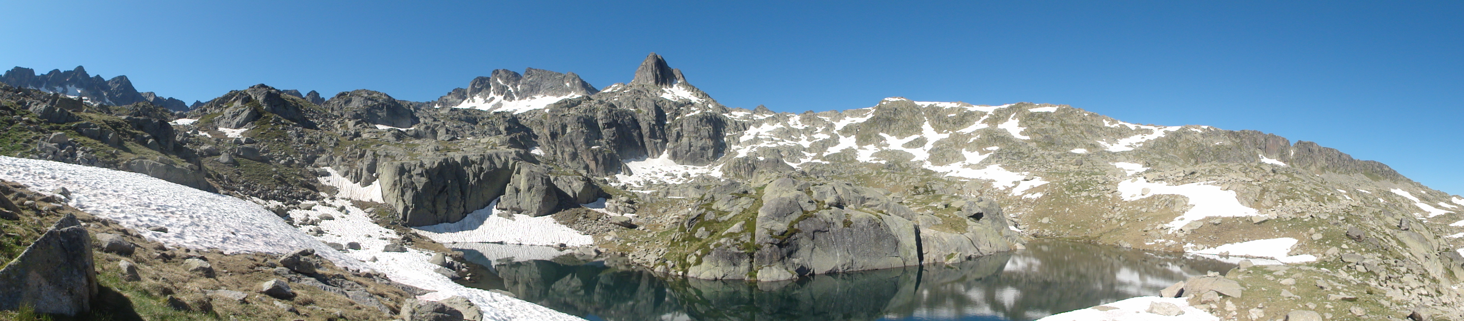 Aigüestortes This is a a photo of a natural area in Catalonia, Spain, with id: ES510081